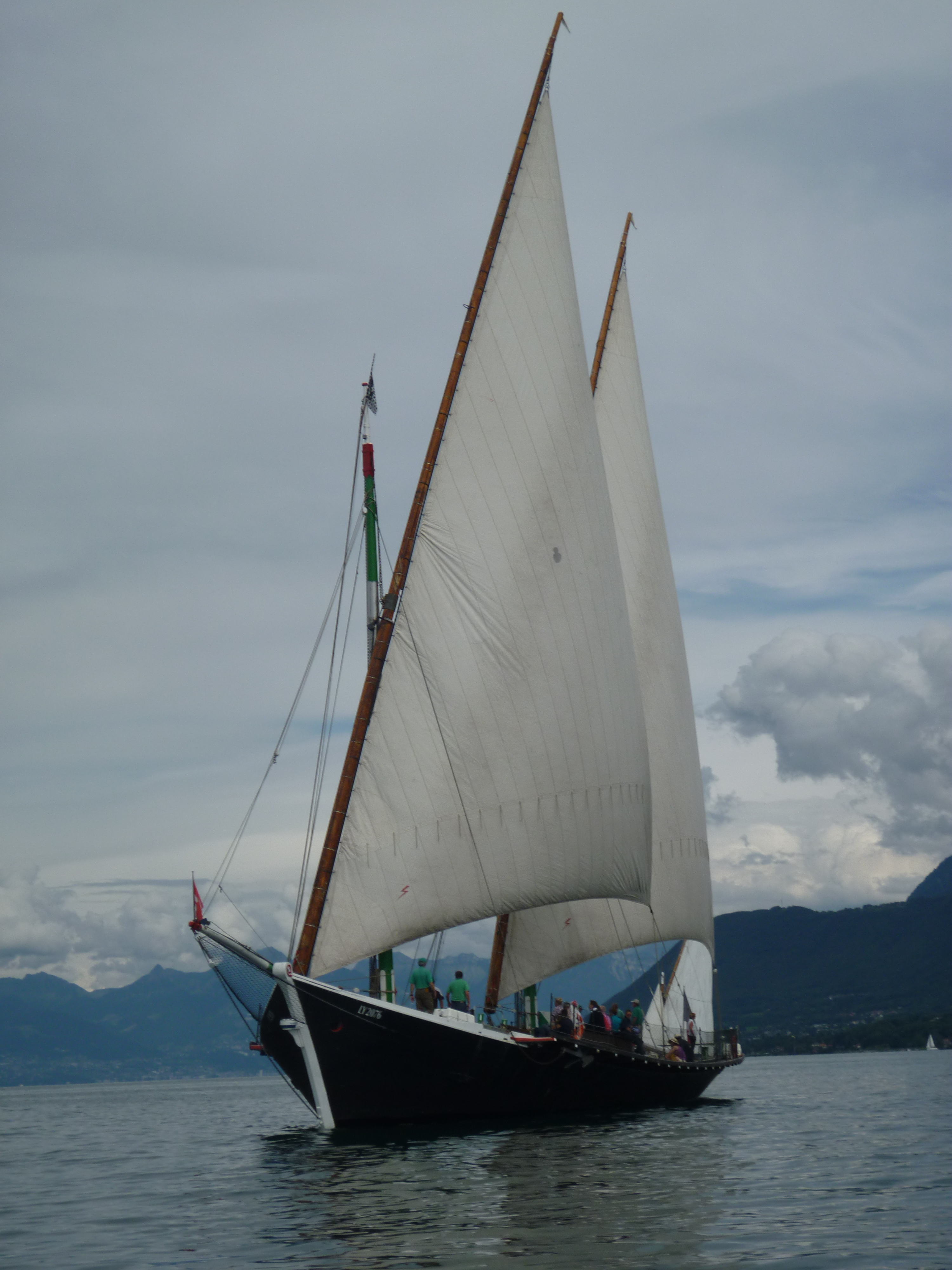 La Savoie, Barque du Léman basée à Evian. Bateau d'Intérêt Patrimonial